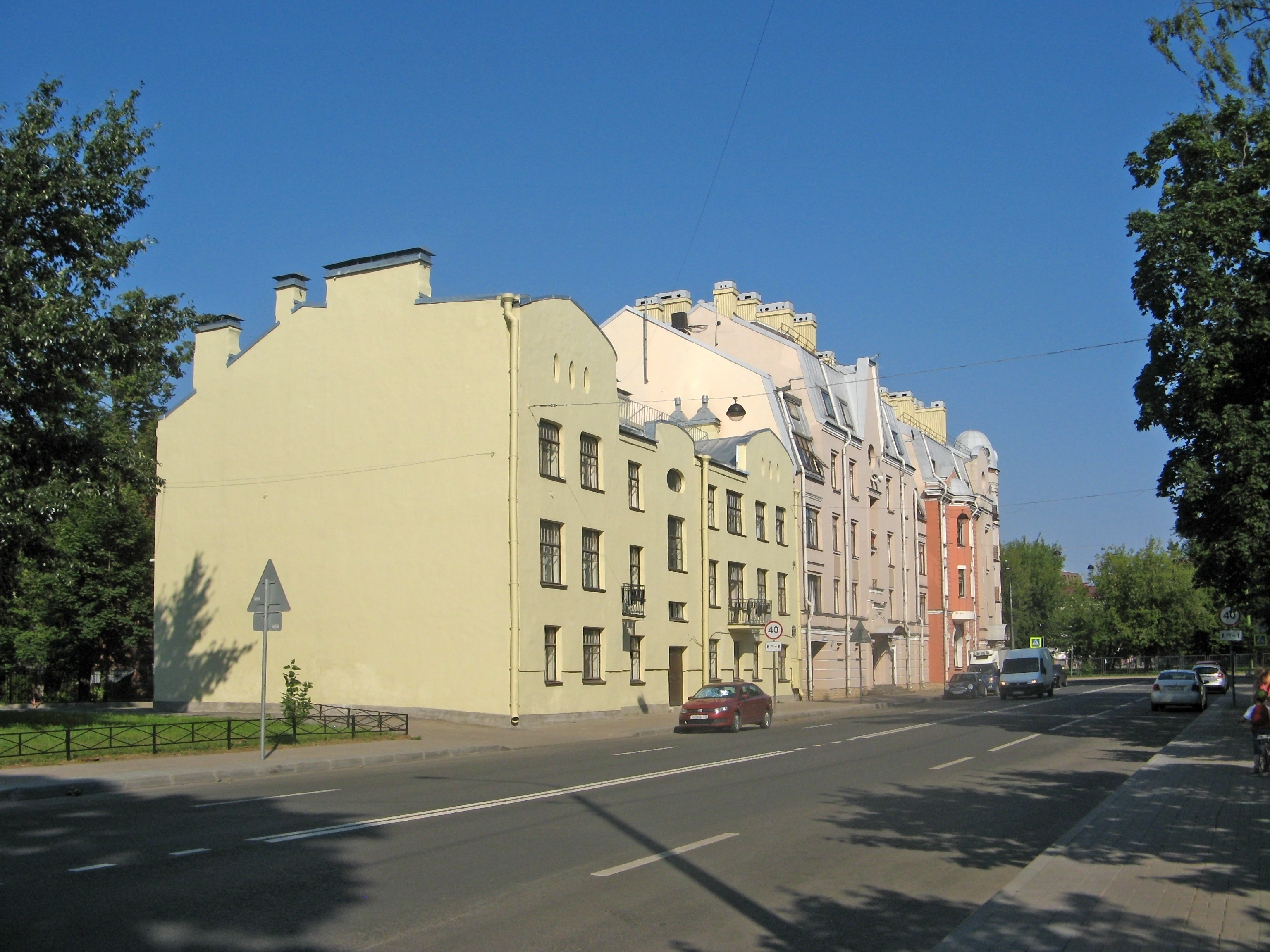 Константиновский проспект в Санкт-Петербурге